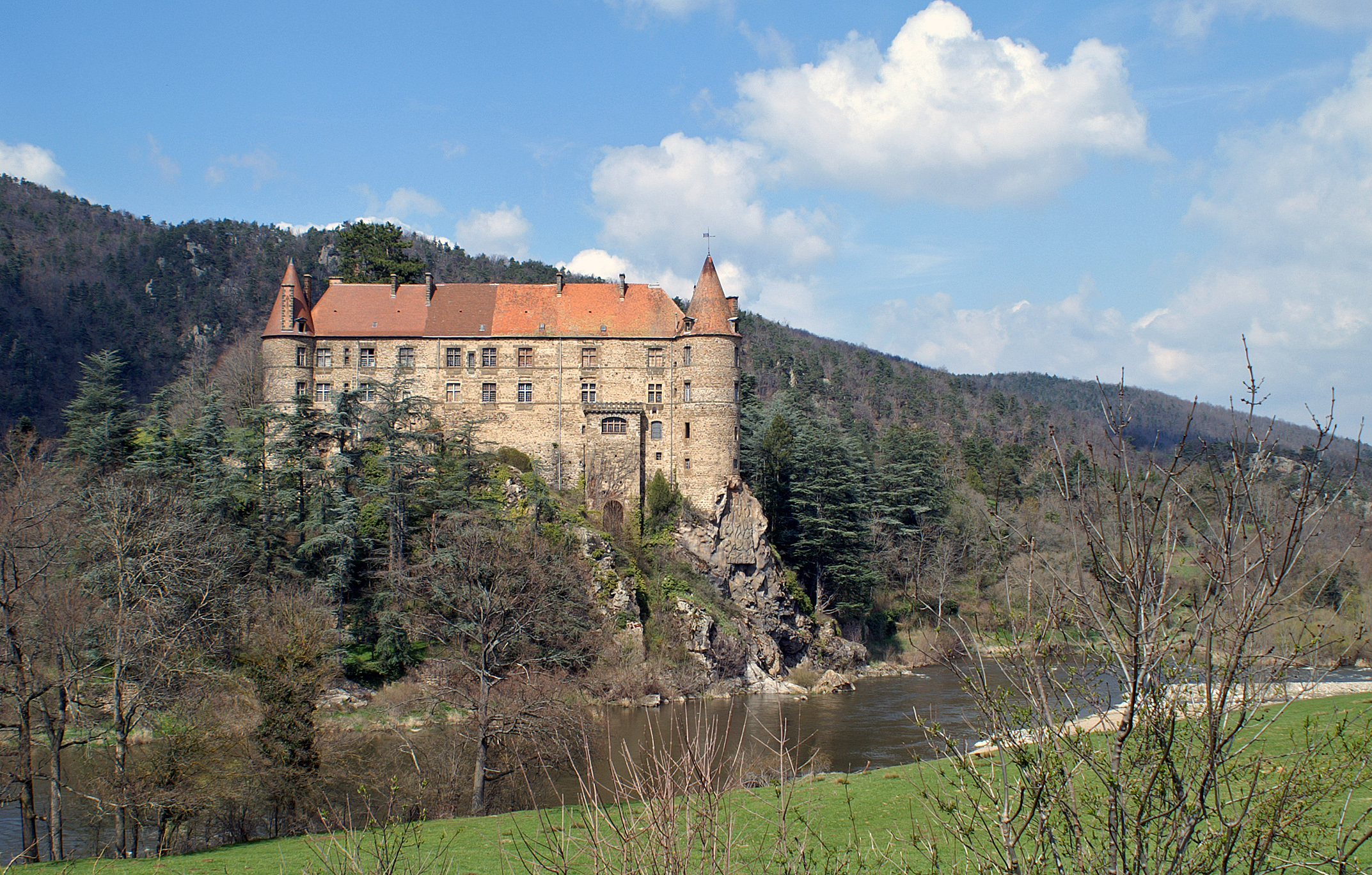 Le nom de Lavoute vient de la boucle que la Loire décrit aux pieds du rocher qui sert de base au château. Le jeune fleuve lui-même semble se laisser prendre par la beauté du paysage. Les Polignac furent attirés en ces lieux non seulement par le charme du site à l’entrée du val d’Emblavès (riche terre à blé), mais aussi par les bois profonds qui dévalent du mont Courant et des hauteurs voisines. Ces forêts étaient un repaire de sangliers et de loups. Quelle joie pour ces seigneurs de chasser les cerfs au milieu des sons de trompes, des aboiements de la meute et des cris de leurs invités se répercutant au fond des bois.” .